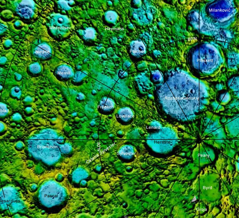 Cráter lunar Froelich. Localización. (Imagen LRO)